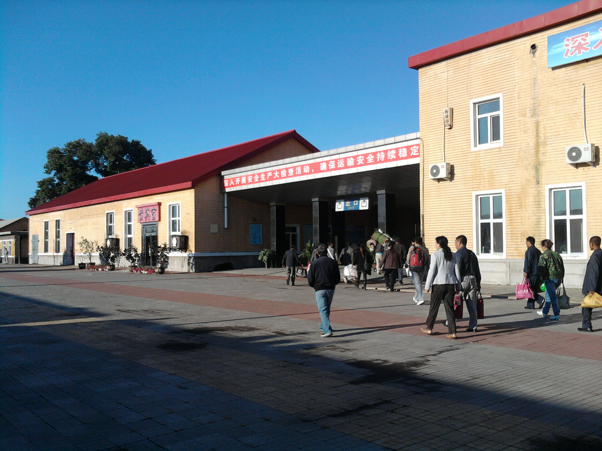 嫩江站